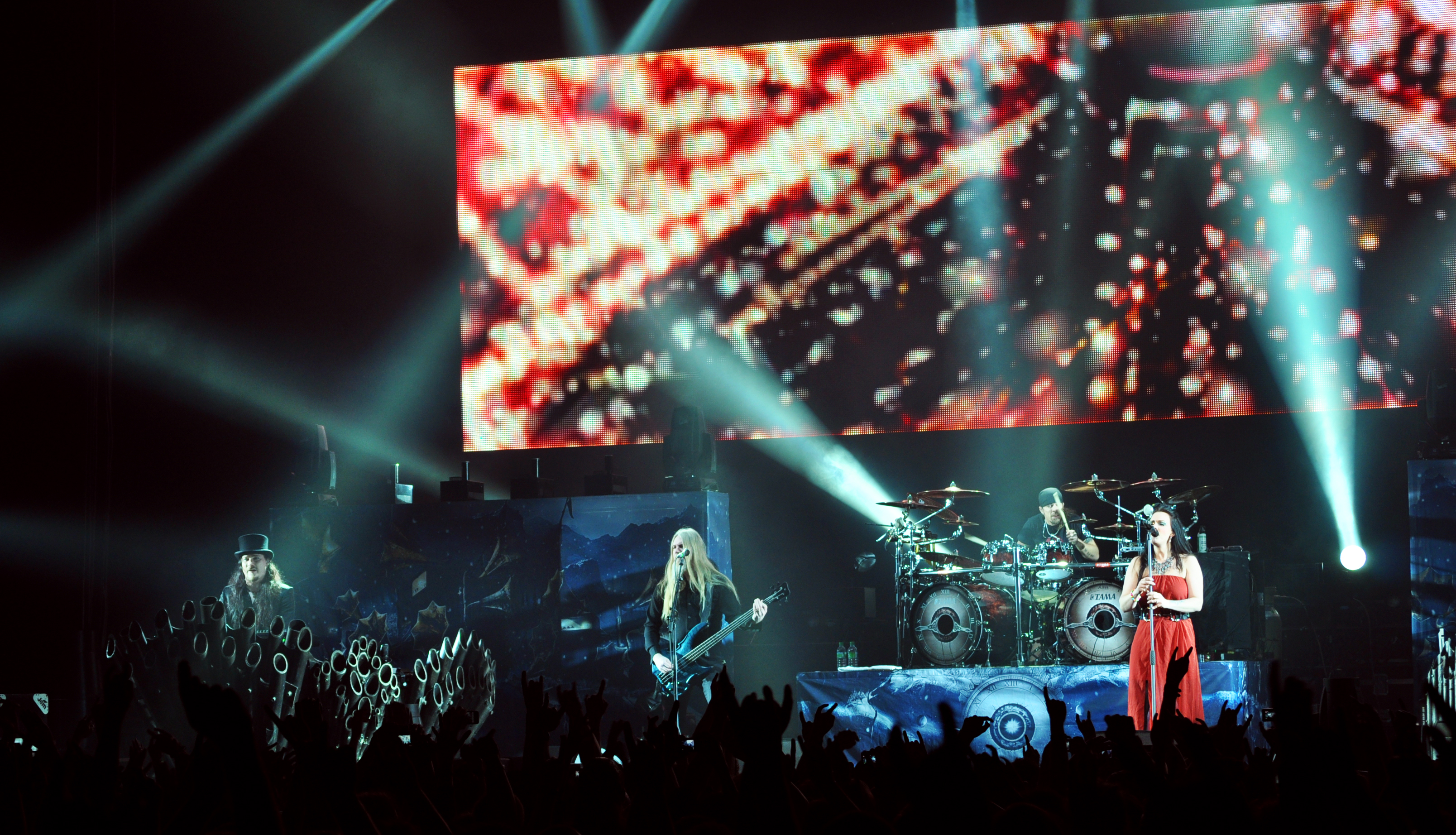 Tuomas Holopainen en concert à Nantes en 2012